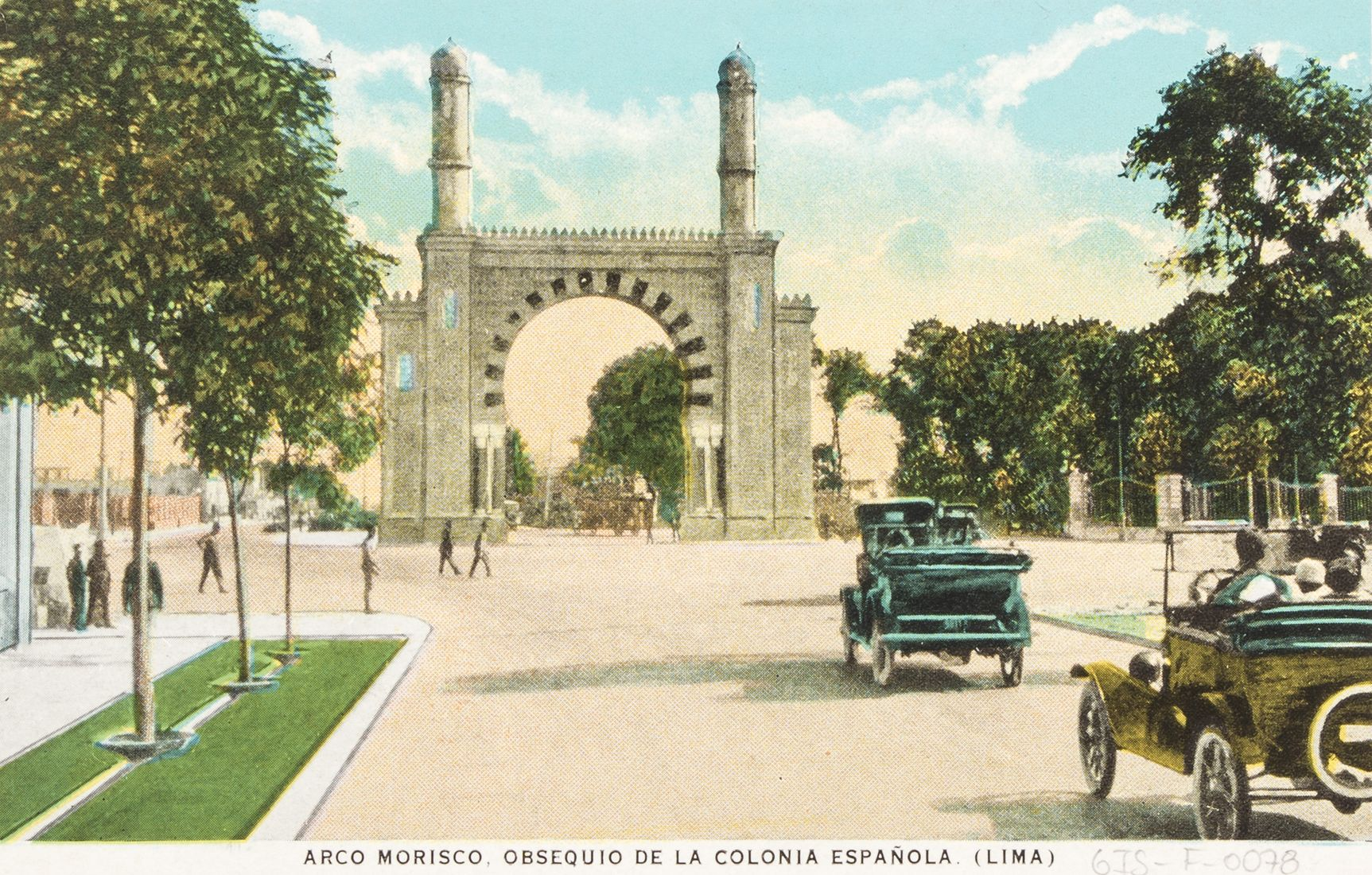 Obsequio de la corona española a Lima.